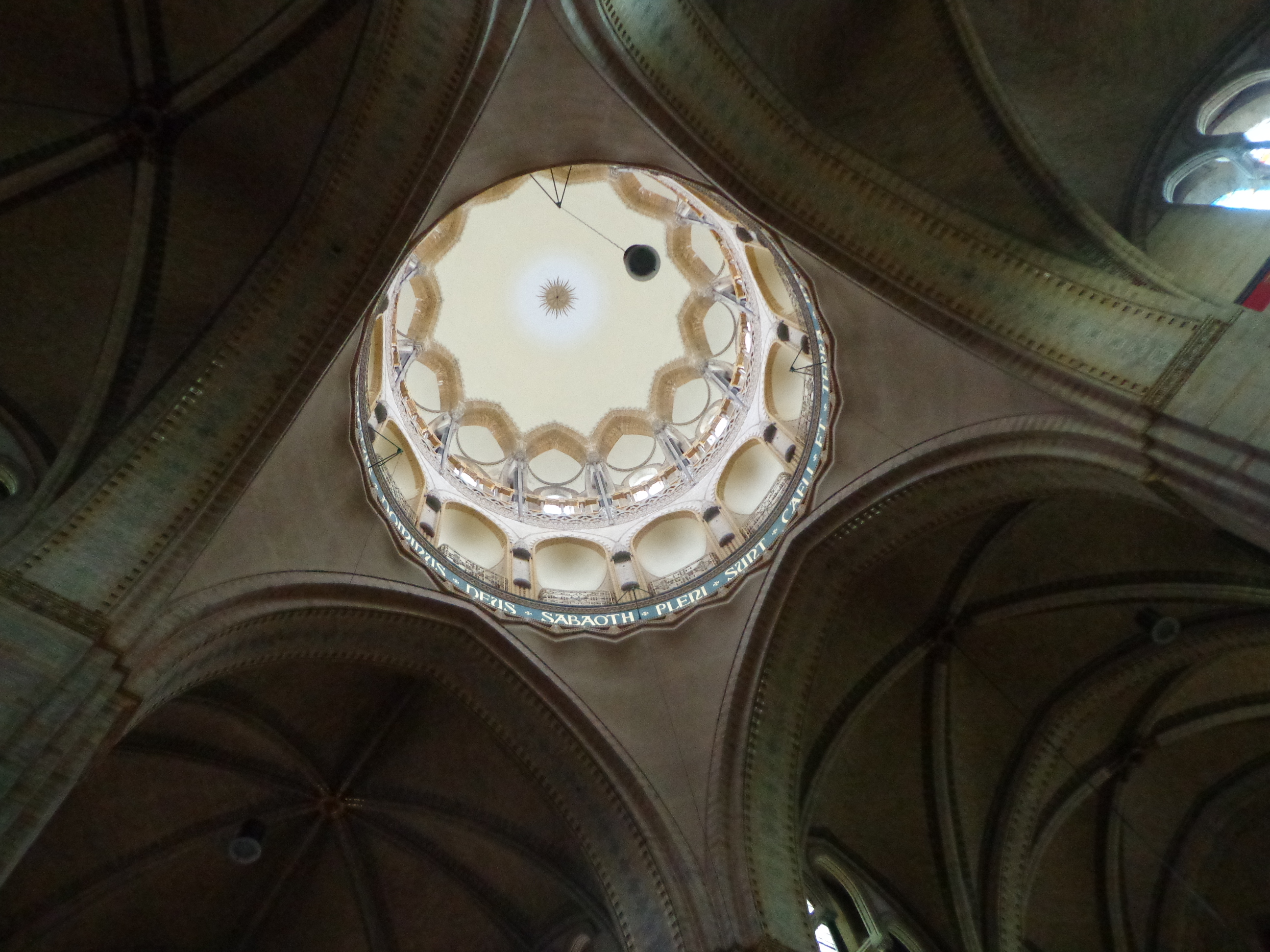 Blick in die Vierungskuppel der Haarlemer Kathedrale